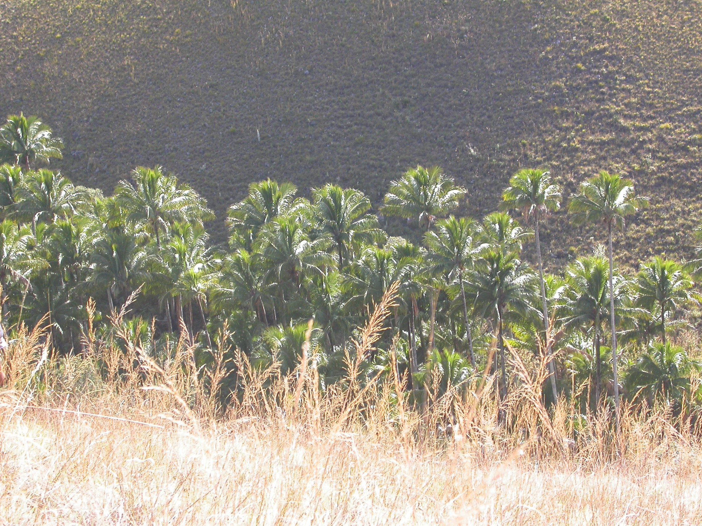 Tall Beccariophoenix alfredii in Habitat, Madagascar